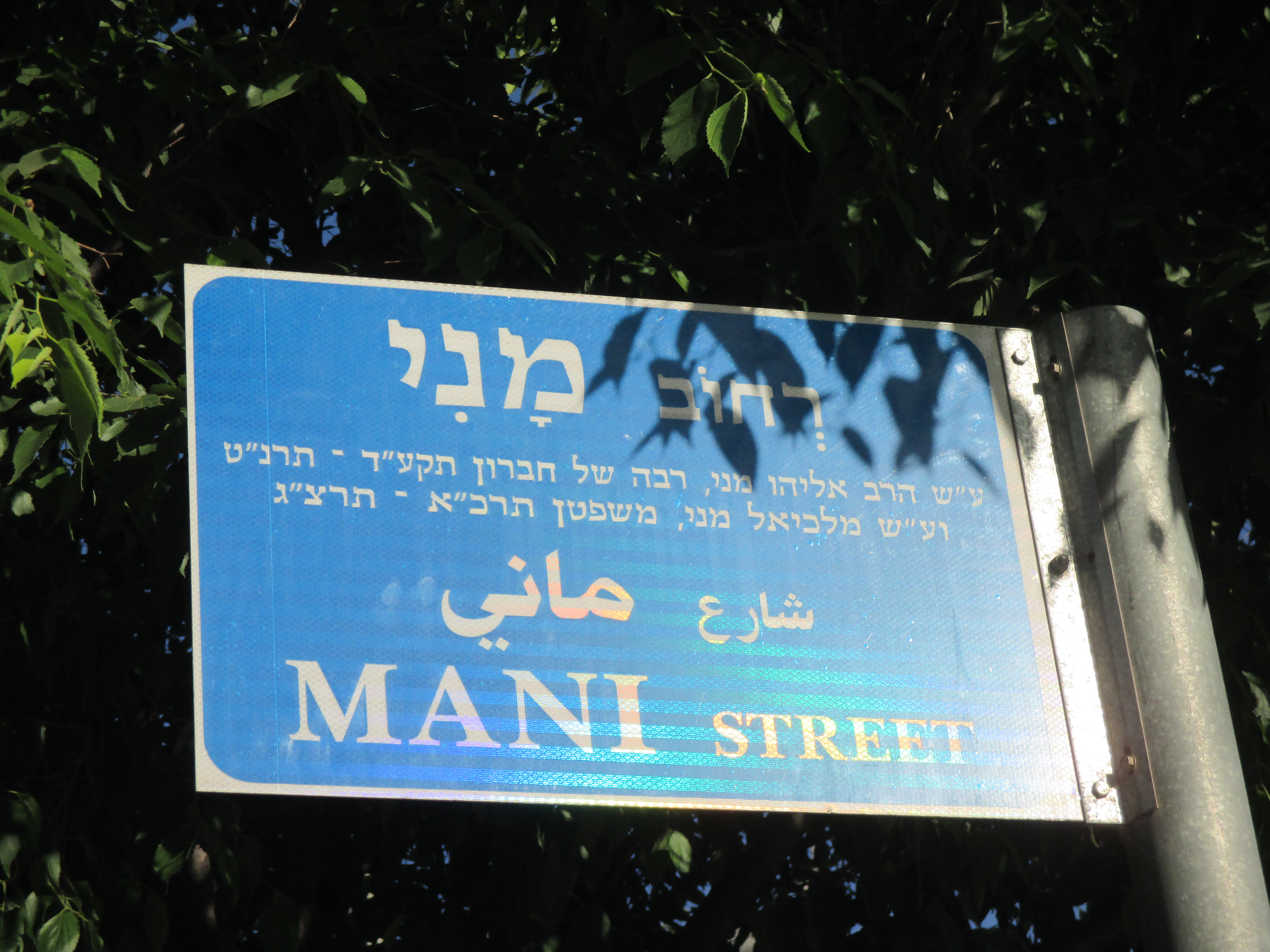 רחוב מני בירושלים על שם הרב אליהו מני ו